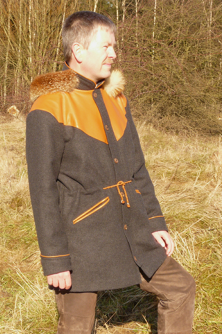 Jacke im Stil moderner Samen/samischer Mode aus Vadmal-Walkstoff mit rotfuchsverbrämter Kapuze.